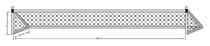 Porta regolamentare di Wheelchair hockey